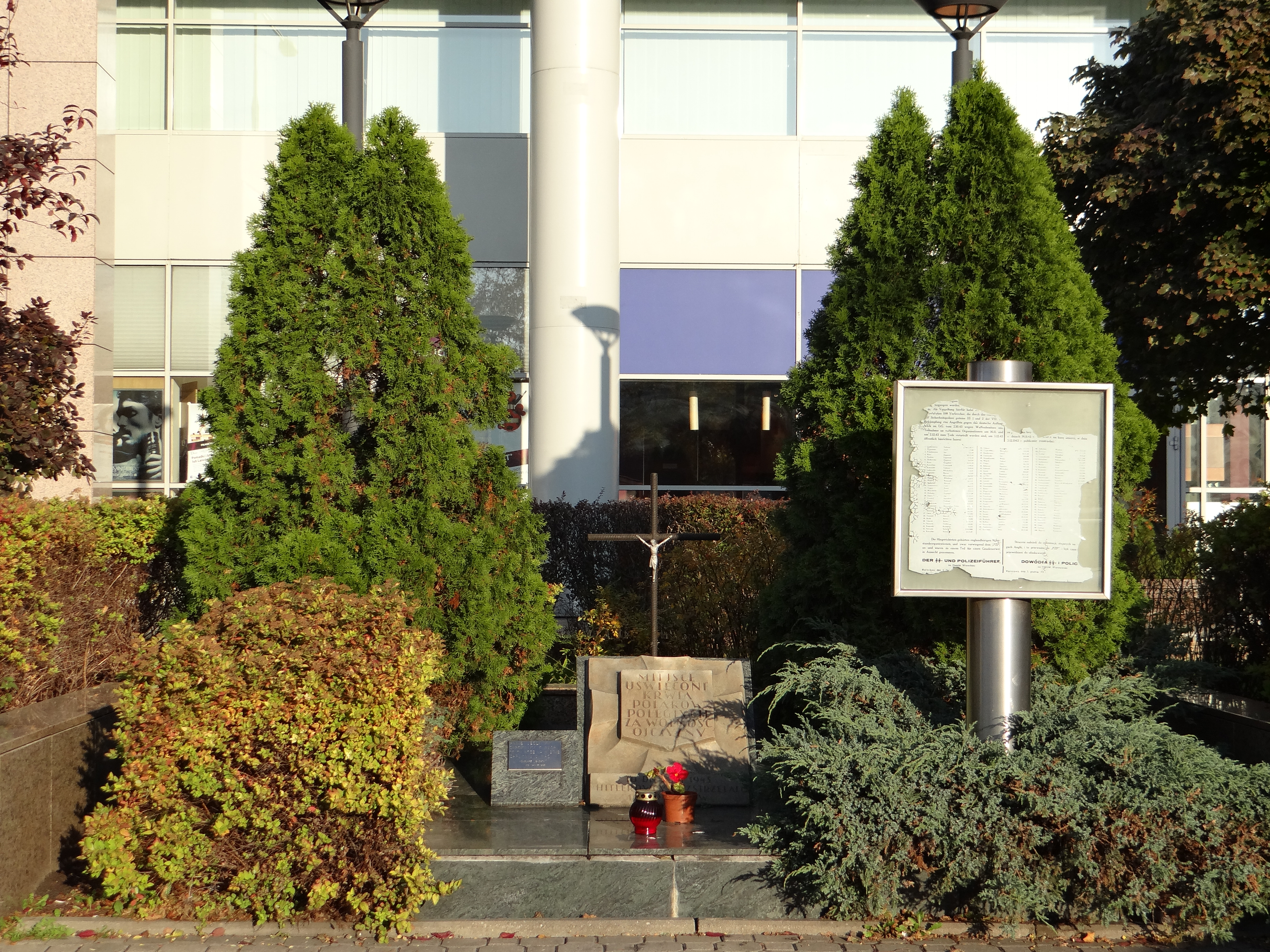 Miejsce Pamięci Narodowej przy ul Puławskiej 15 w Warszawie